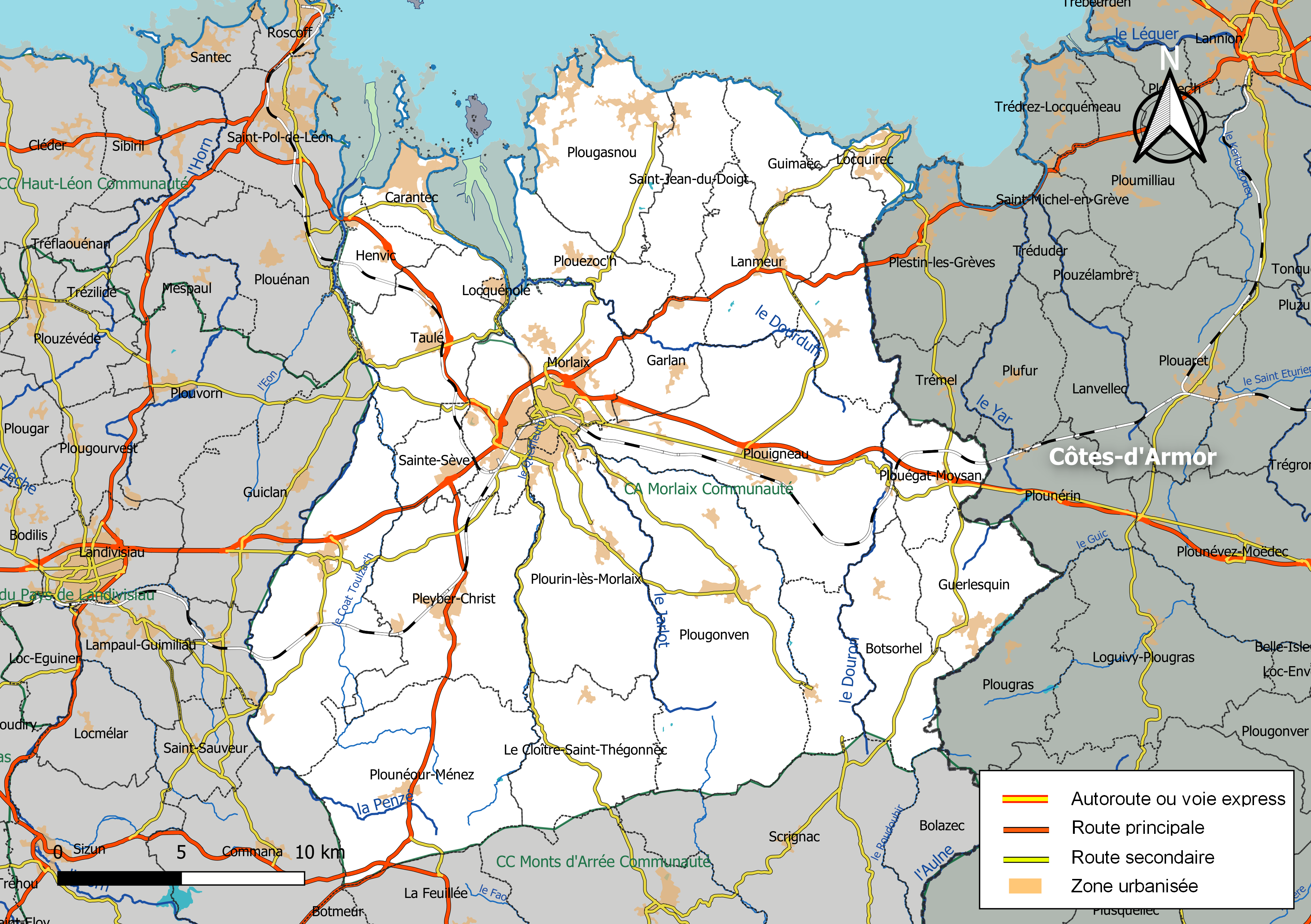 Carte géographique de l'intercommunalité Morlaix Communauté, département du Finistère, France. Composition au 1er janvier 2019.